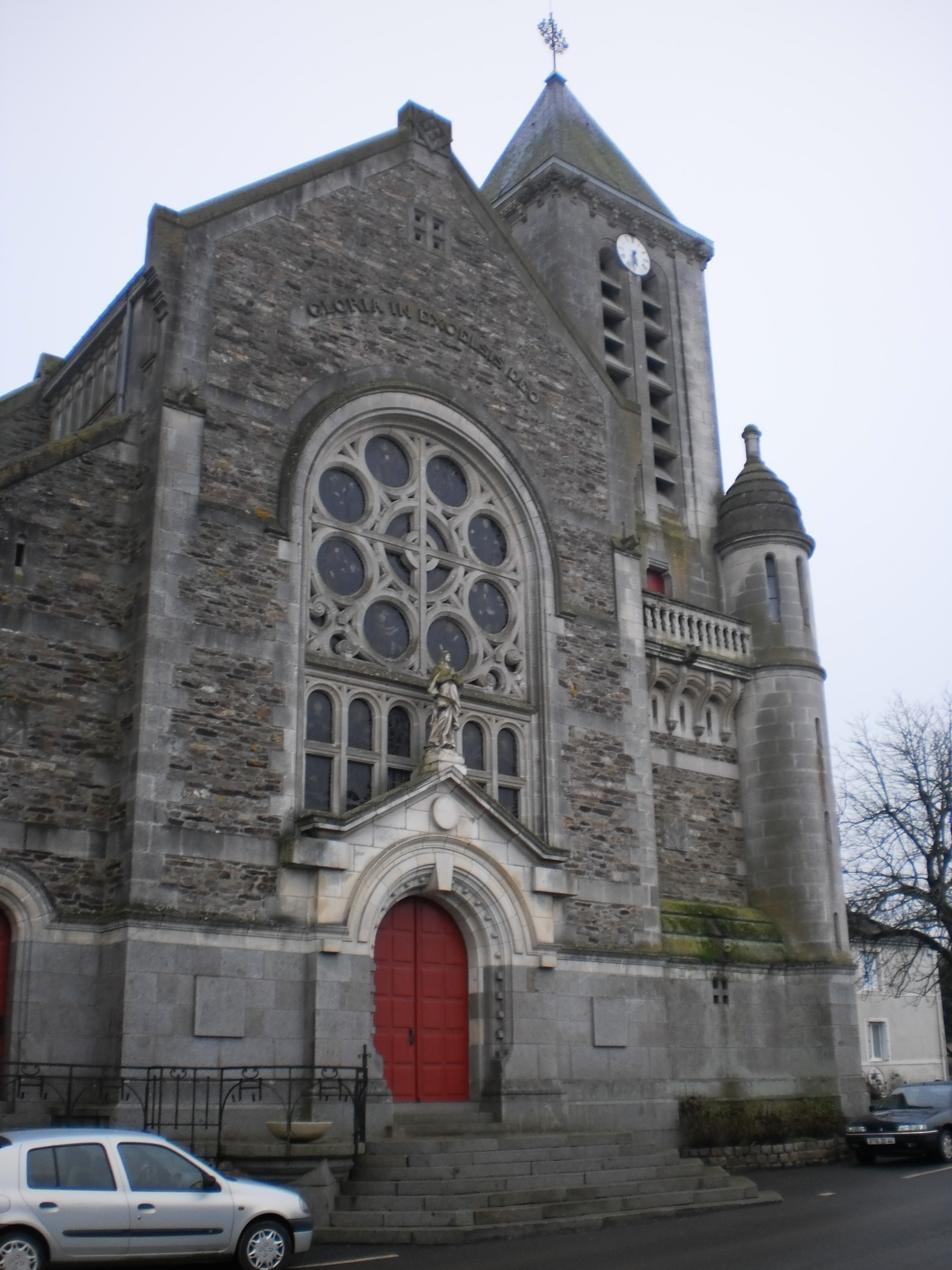 Belligné (Loire-Atlantique, France) - église